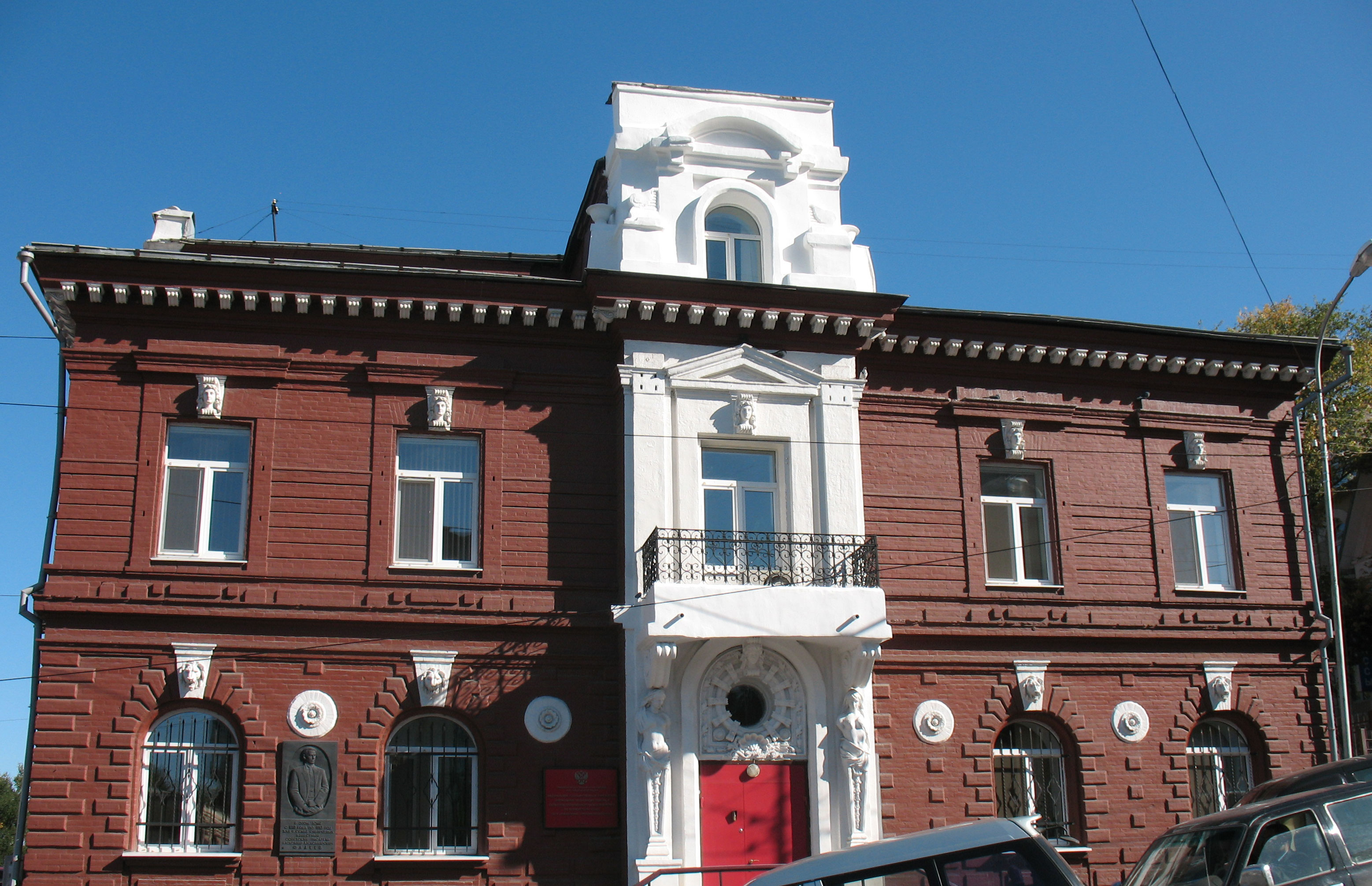 В этом доме жил А.А. Фадеев (Владивосток, ул. Прапорщика Комарова, 21)